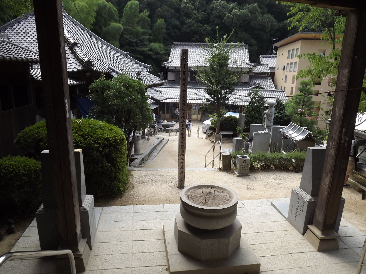 栄福寺の境内を本堂より